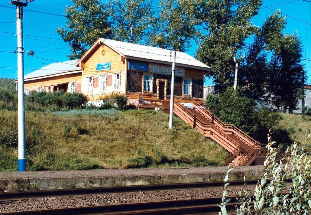 Ж/д вокзал